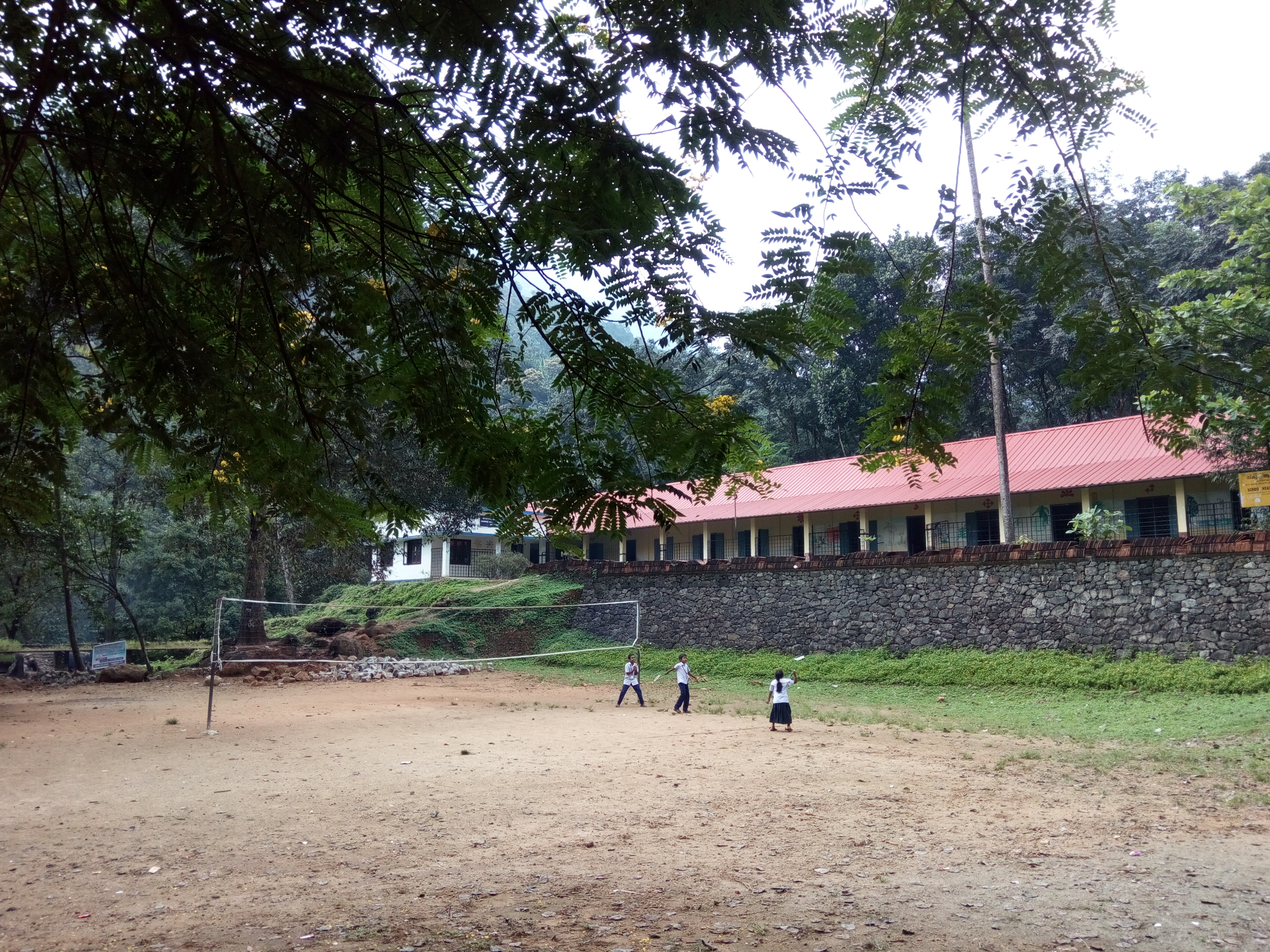 Govt high school adukkam